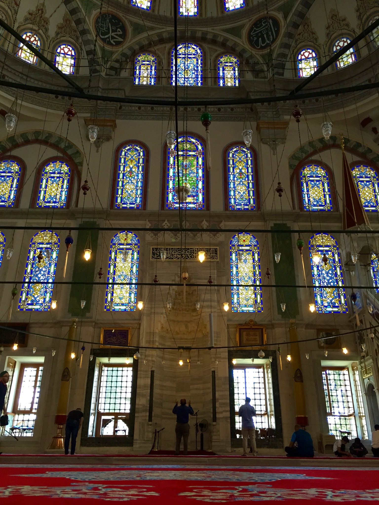 Fatih Camii mihrap yakın çekim